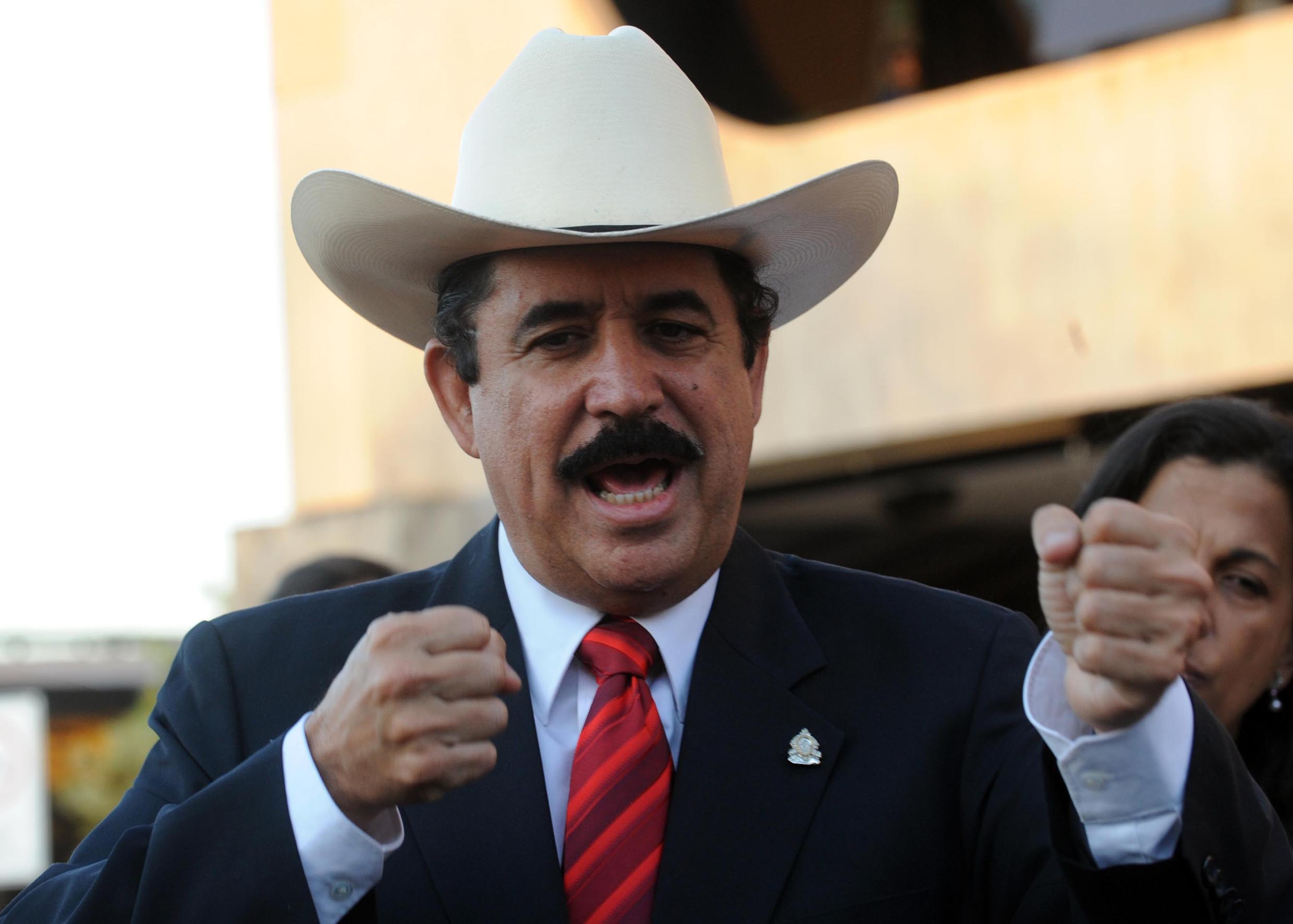 Brasília - O presidente de Honduras, José Manuel Zelaya, concede entrevista coletiva após encontro com o presidente Lula no CCBB Foto: Wilson Dias/ABr